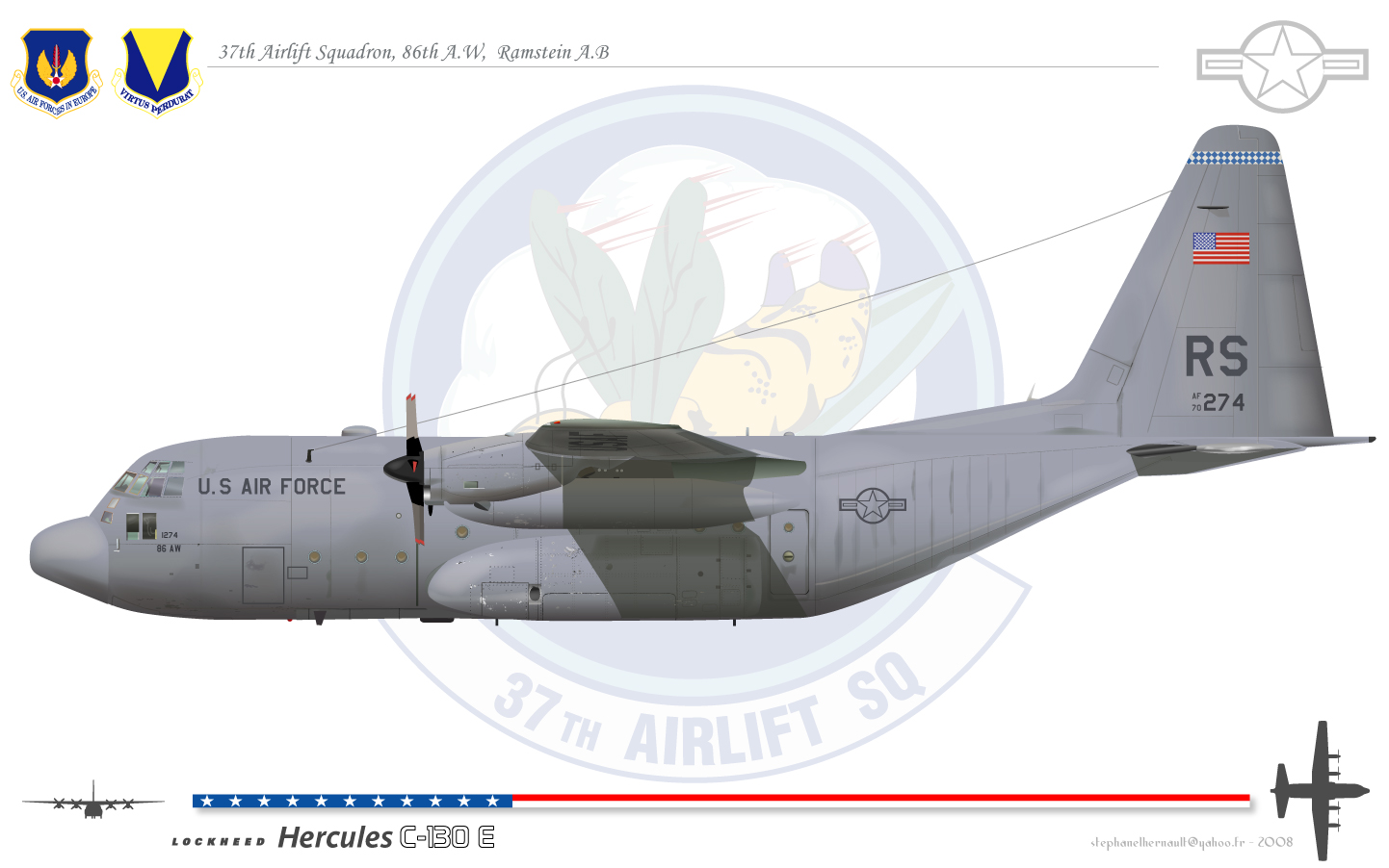 C 130E US Air Force 37th Airlift Squadron